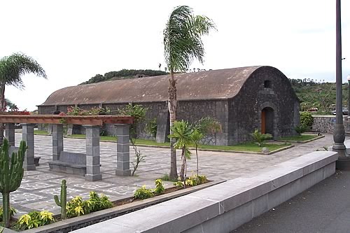 Casa de la pólvora, situada entre el Auditorio y el Parque César Manrique, en Santa Cruz de Tenerife (Tenerife, España).